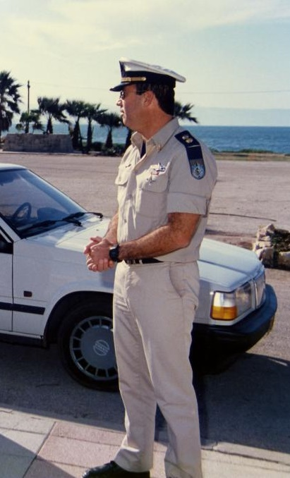 מפקד הקדטים סא"ל ארנון אורי1996